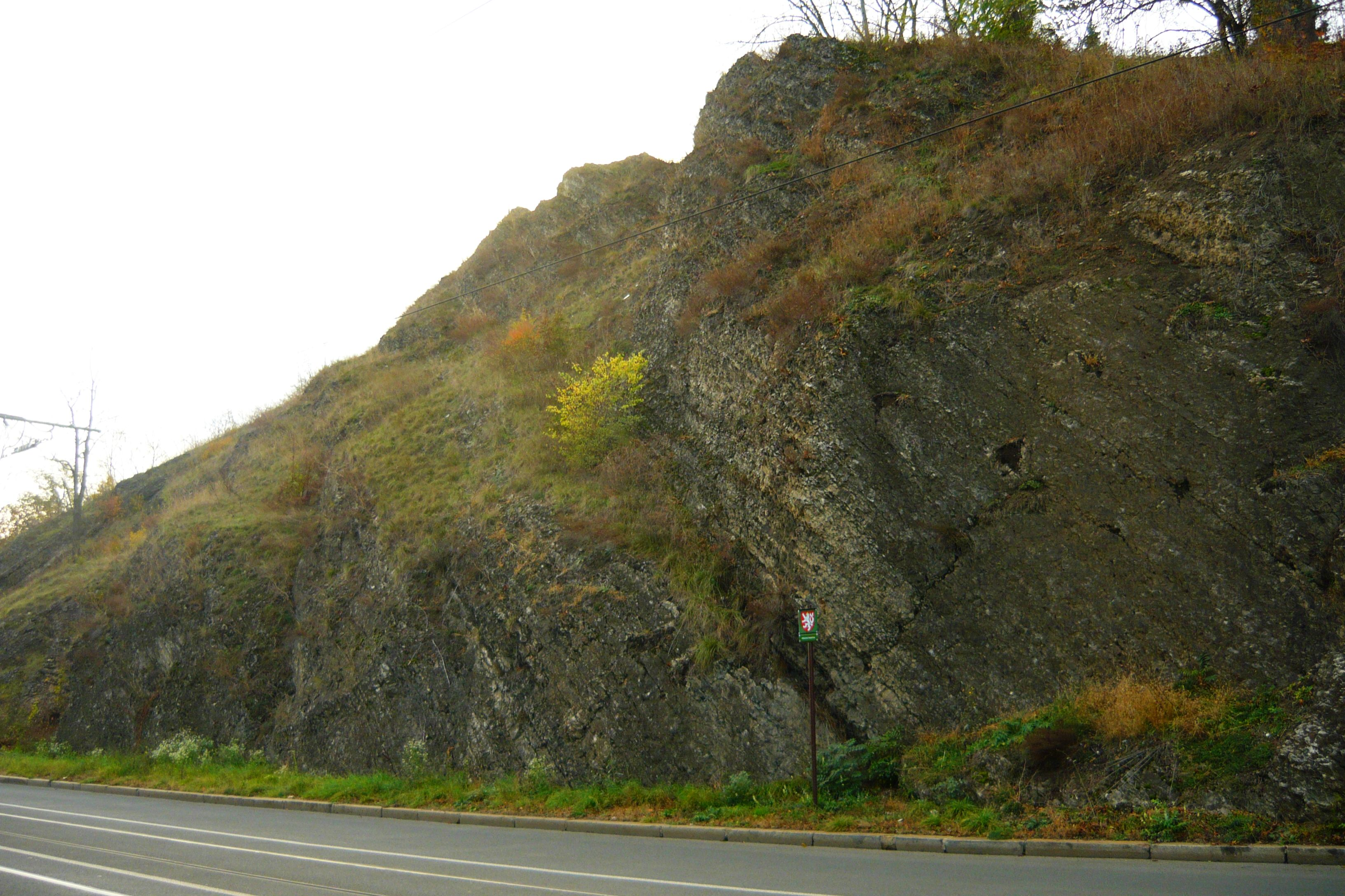 Východní svah přírodní památky Pod Žvahovem